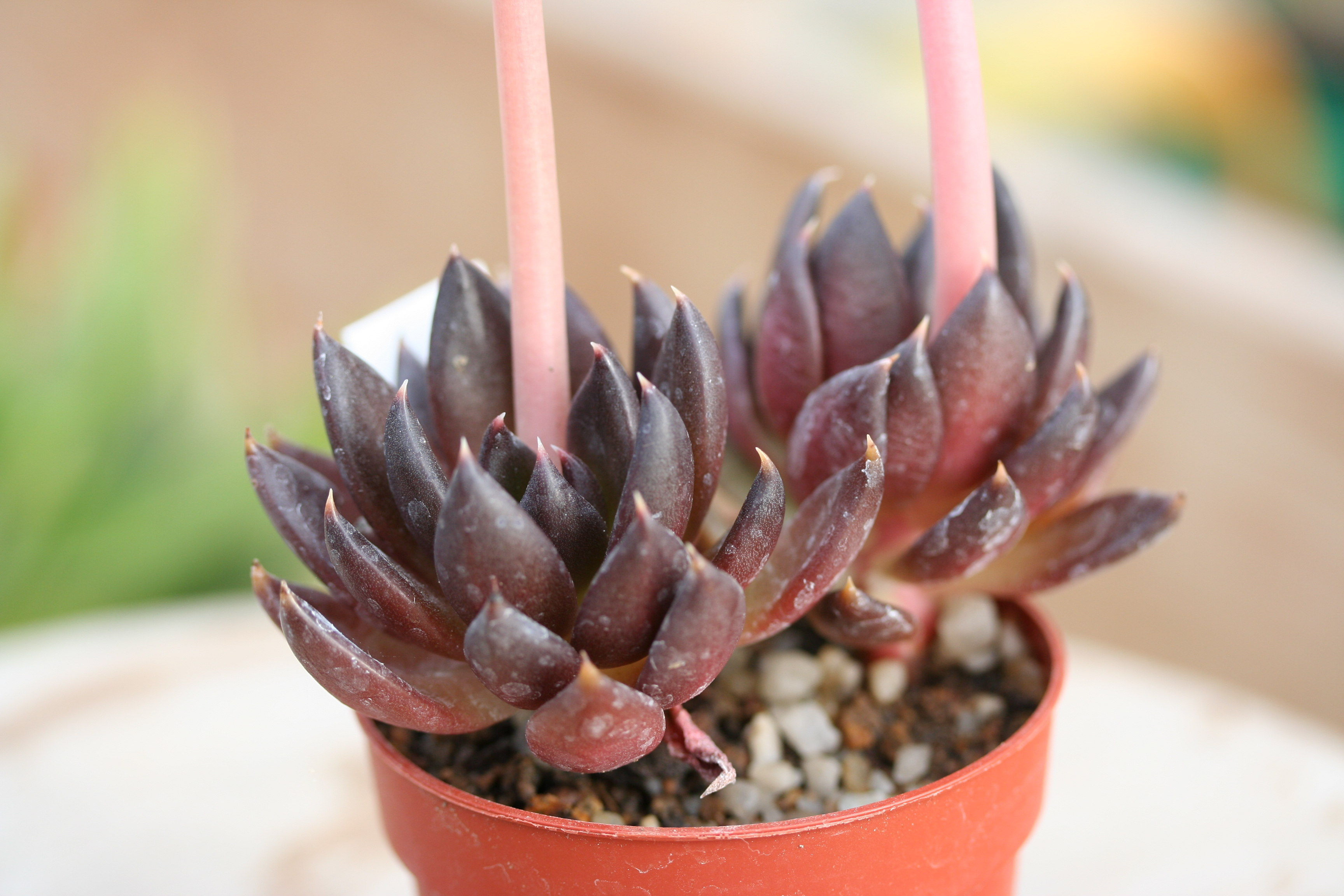 Echeveria affinis in Kultur